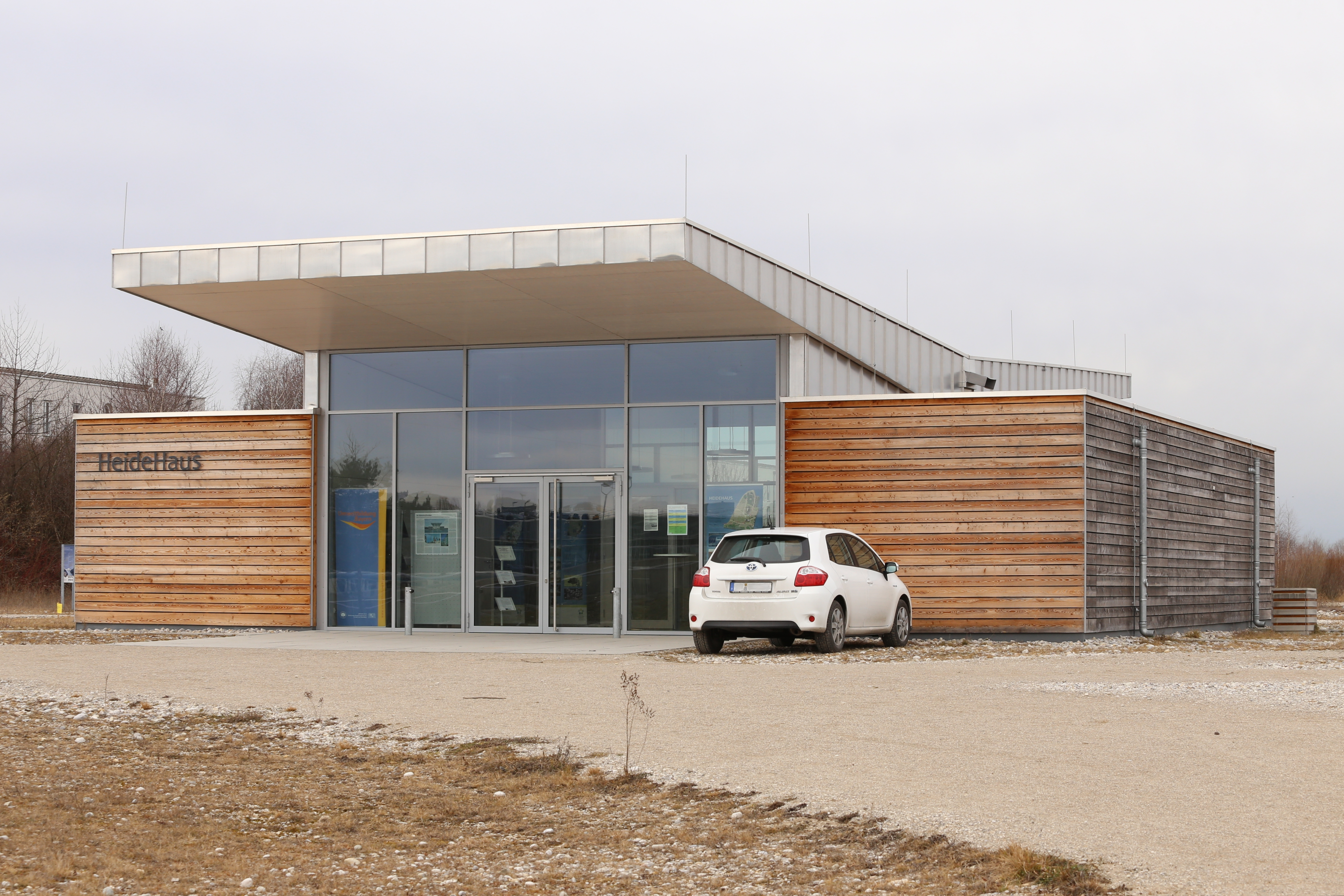 Fröttmaninger Heide Heide-Haus